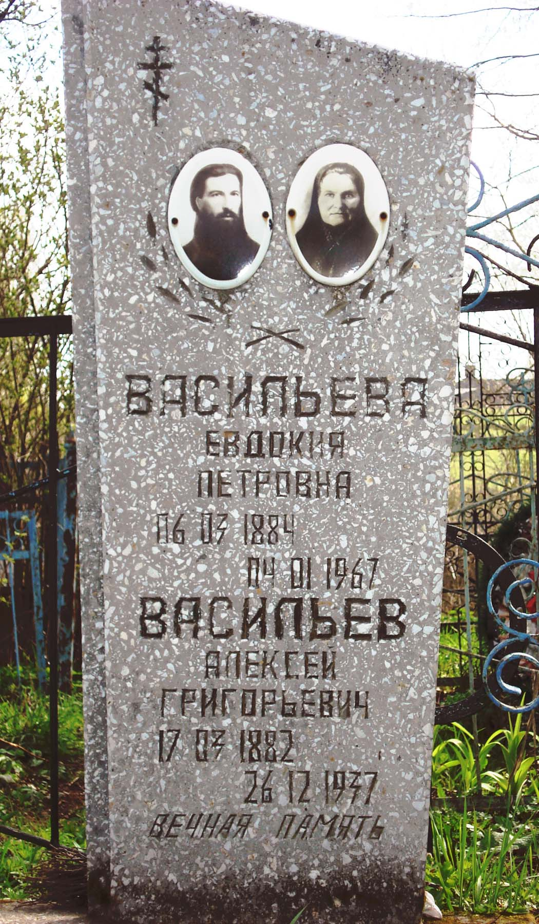 Могила старообрядческого священника Алексея Васильева с женой. Федурино Вачского района Ниегородской обл.